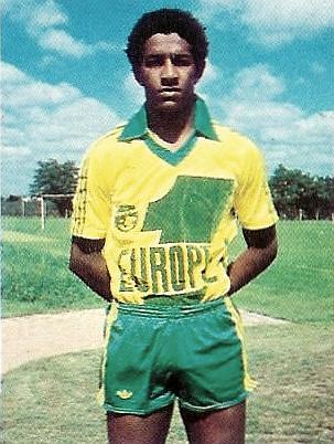 José Touré en 1979, 'Football 1979 - 1980', Panini figurina.